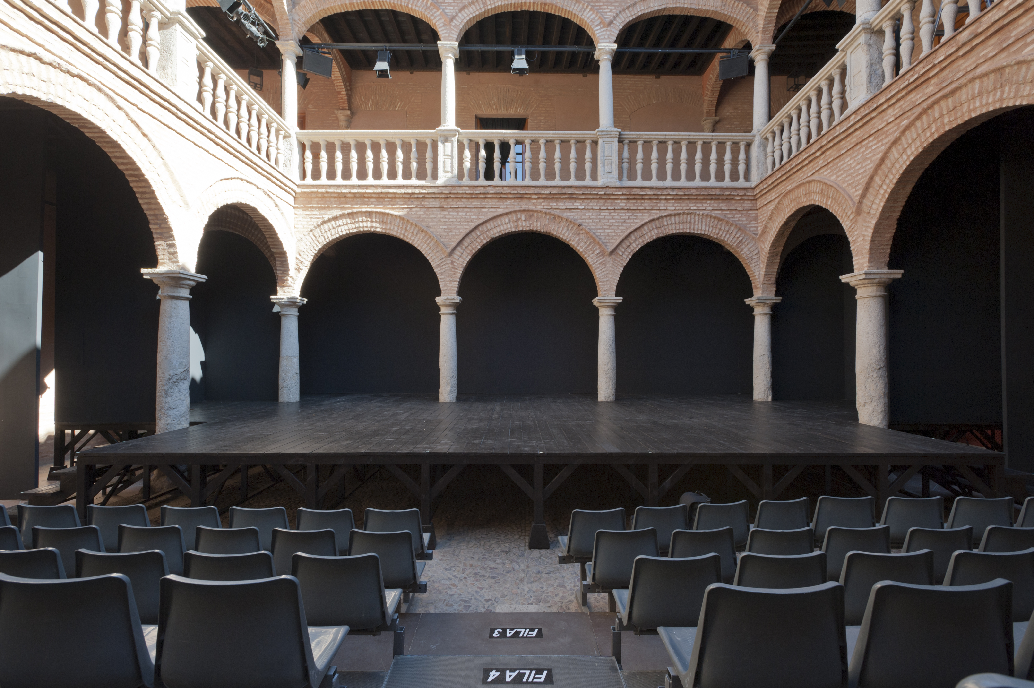 Conoce los Espacios Escénicos del Festival en su 35 edición. Fotografías de Guillermo Casas Baruque, propiedad de la Fundación Festival Internacional de Teatro Clásico de Almagro.